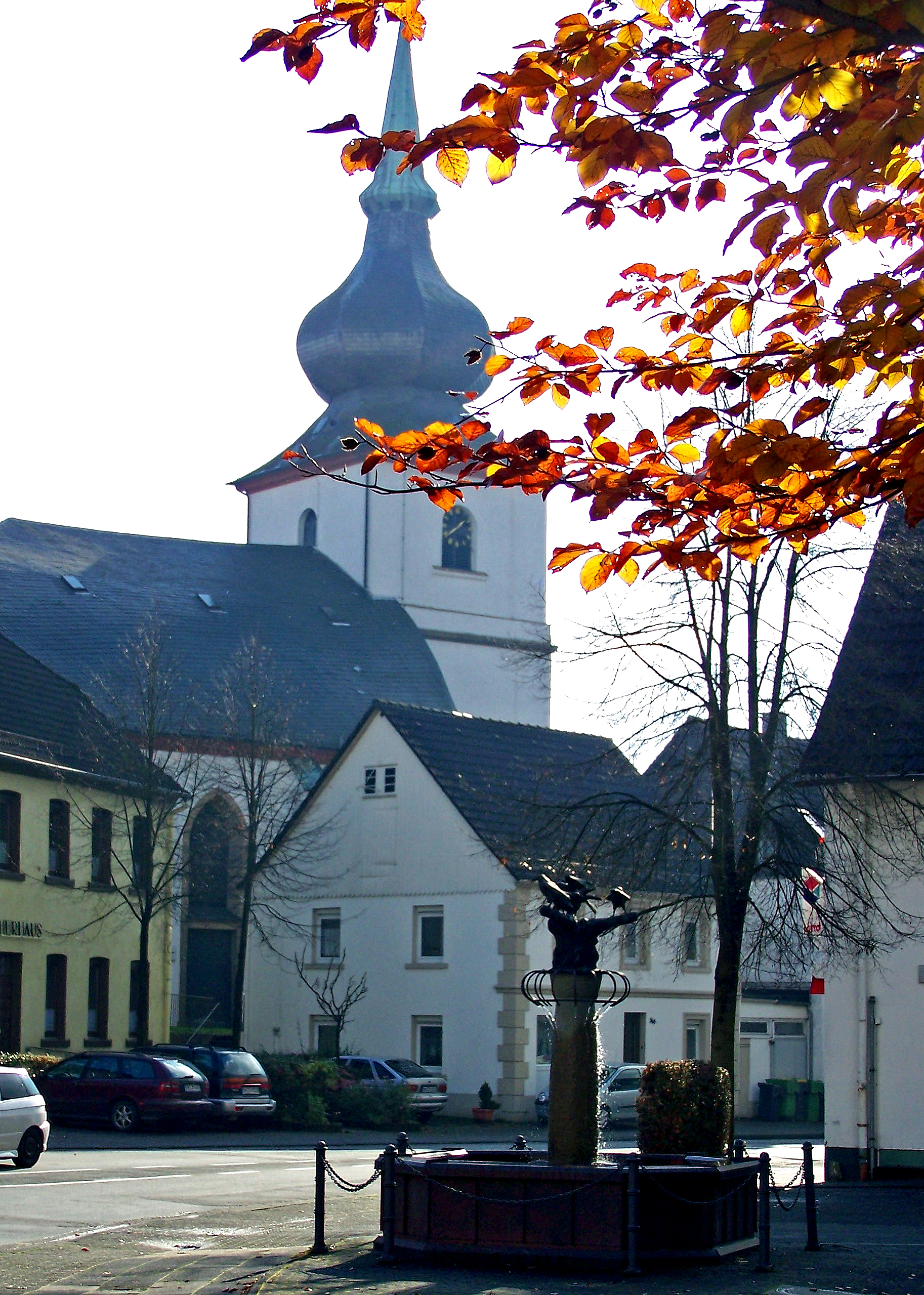 Kierspe mit Margarethenkirche und Raukbrunnen